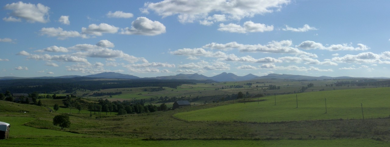 Panorama sur les monts du Cantal depuis Chavanon (Allanche)